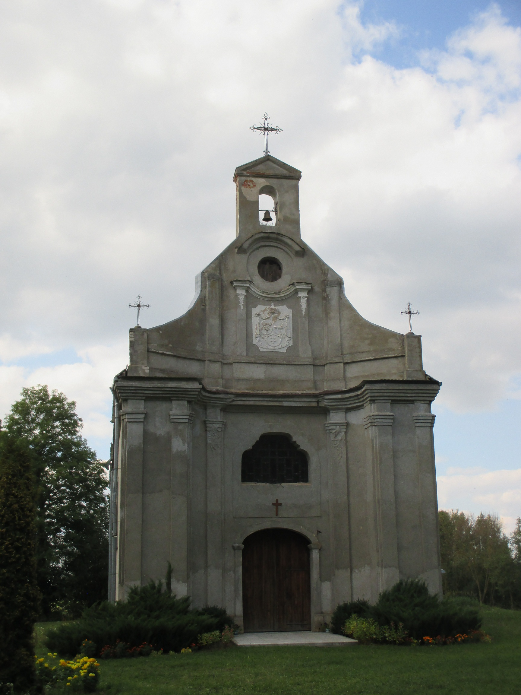 Пагародна, Воранаўскі раён. Капліца, фасад